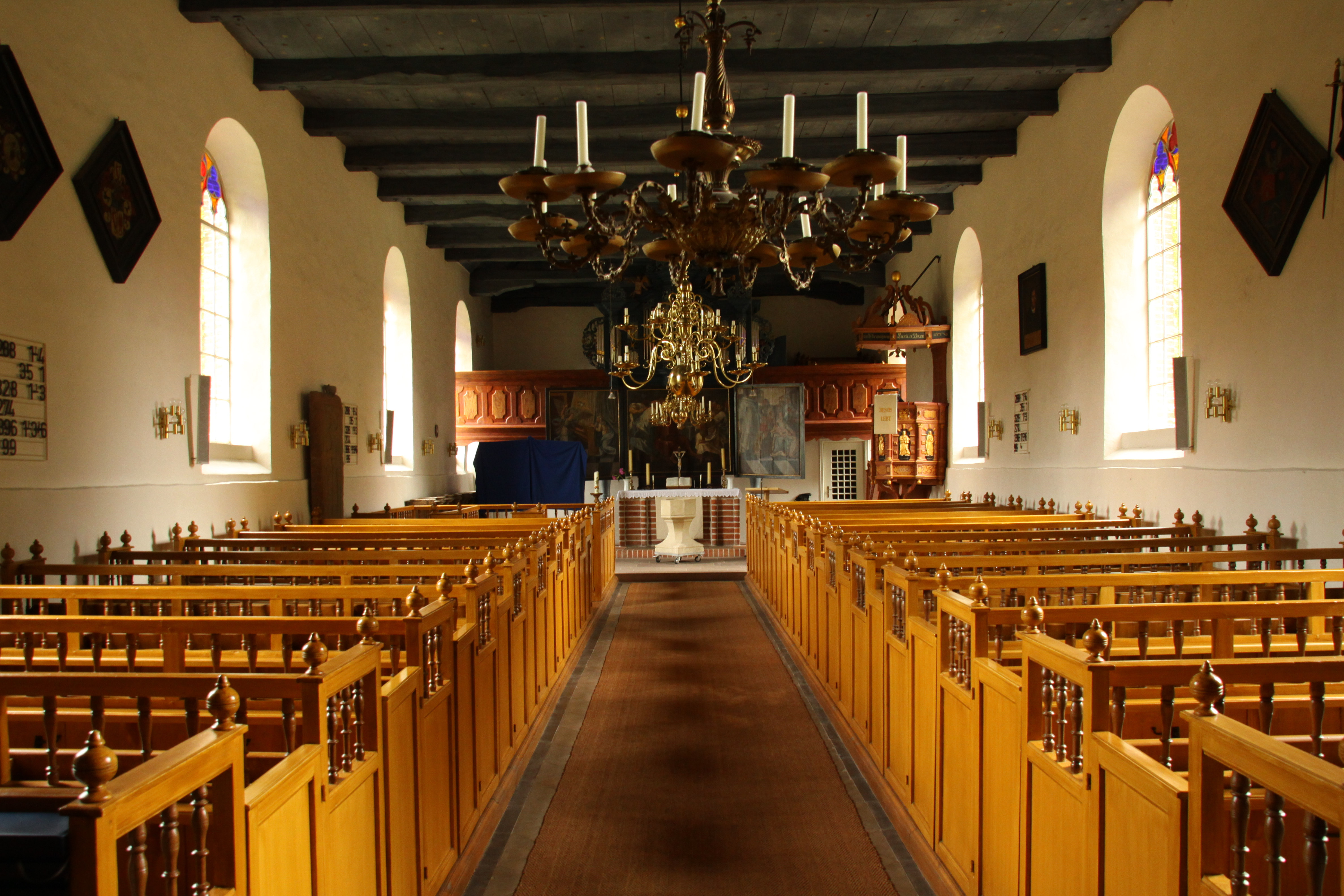 Innenraum der St.-Georg-Kirche (Nortmoor)